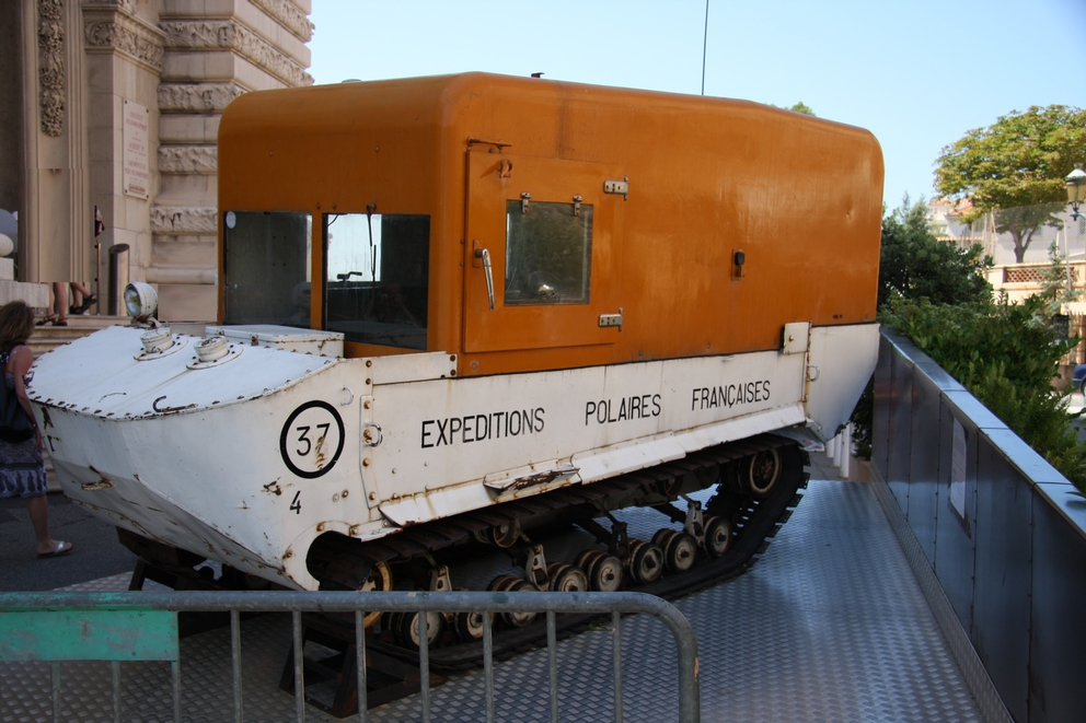 Le M29 Weasel destiné aux expéditions polaires françaises et exposé devant le musée océanographique de Monaco